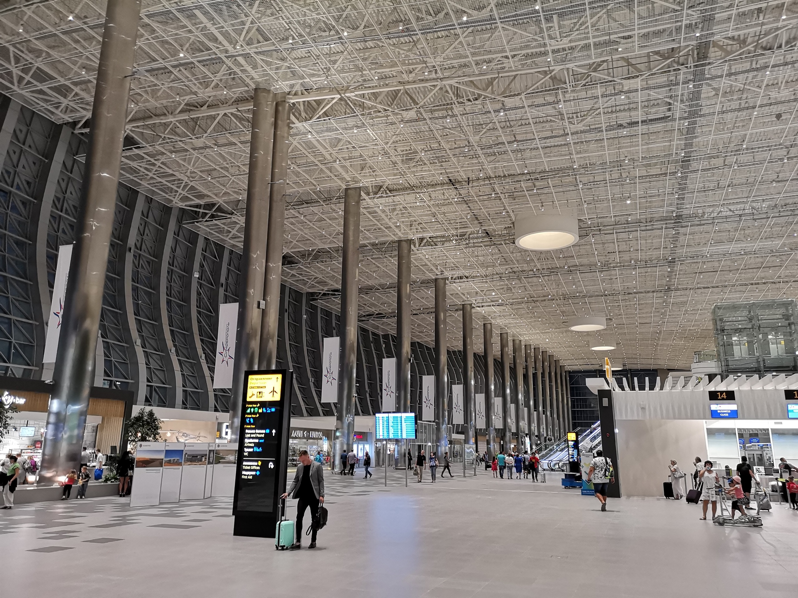 Новый терминал аэропорта "Симферополь"